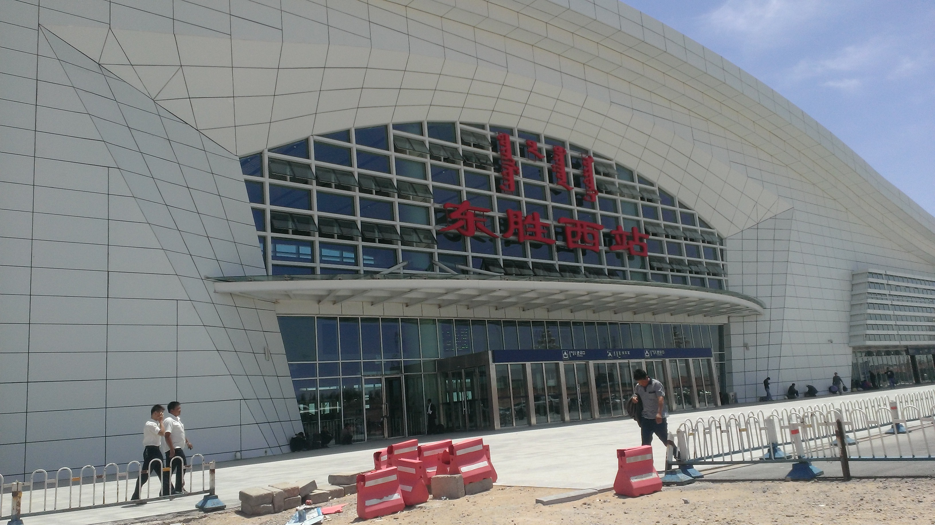 东胜西站。